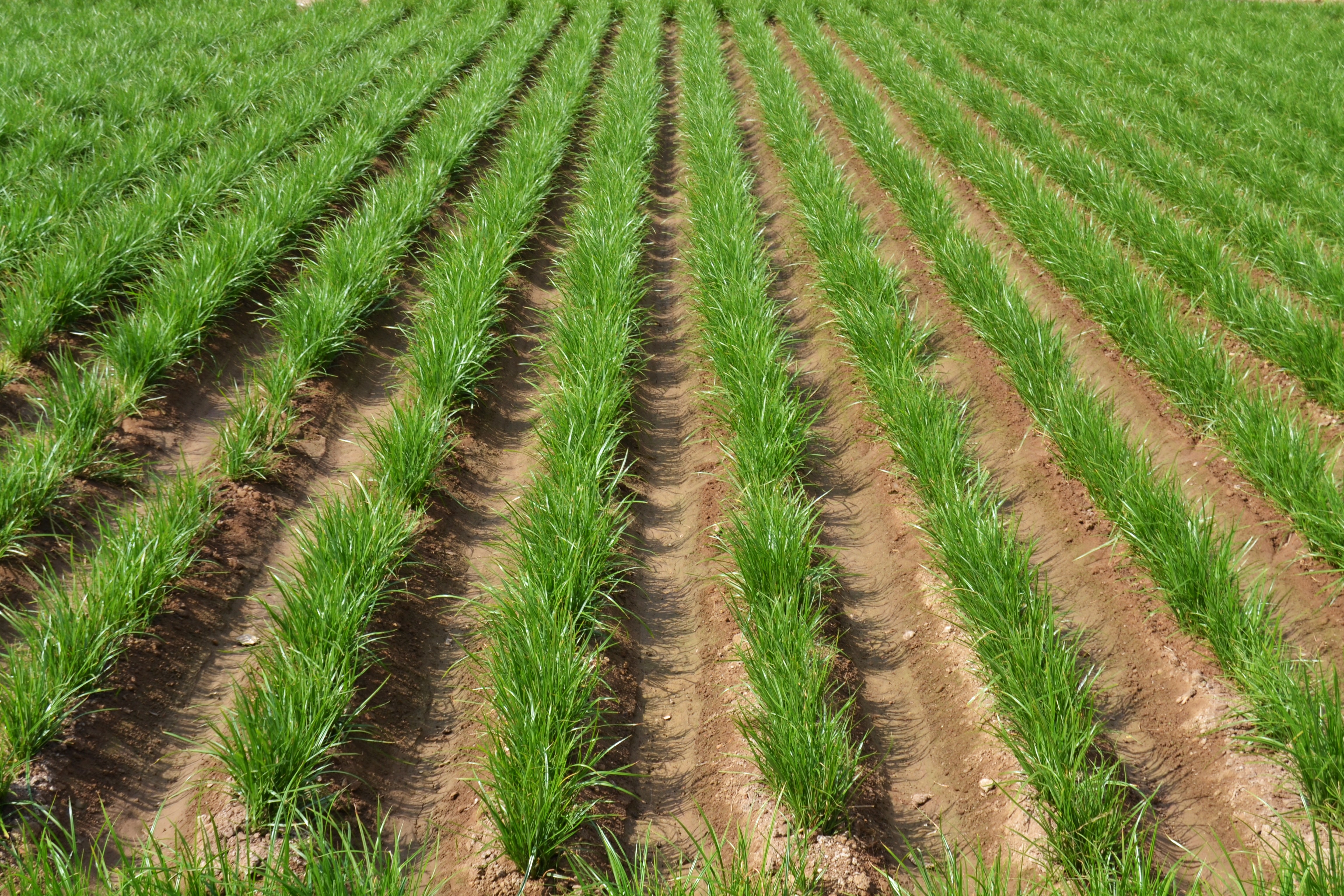 Camp de xufa al costat de l'ermita de Vera, València.